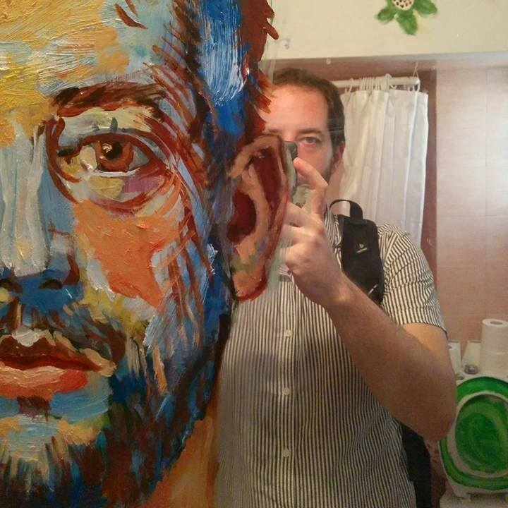 דיוקן עצמי בשמן ואקריליק על מראה.